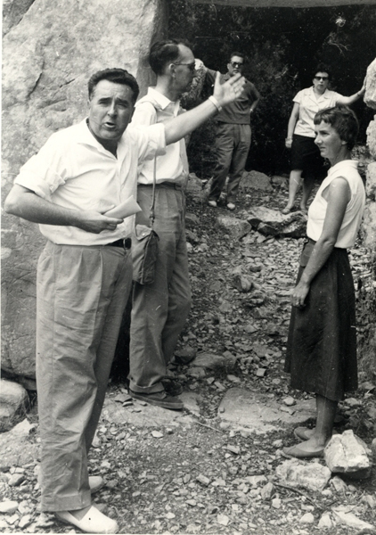 Martín Almagro Basch. Número de inventario: FD00329.